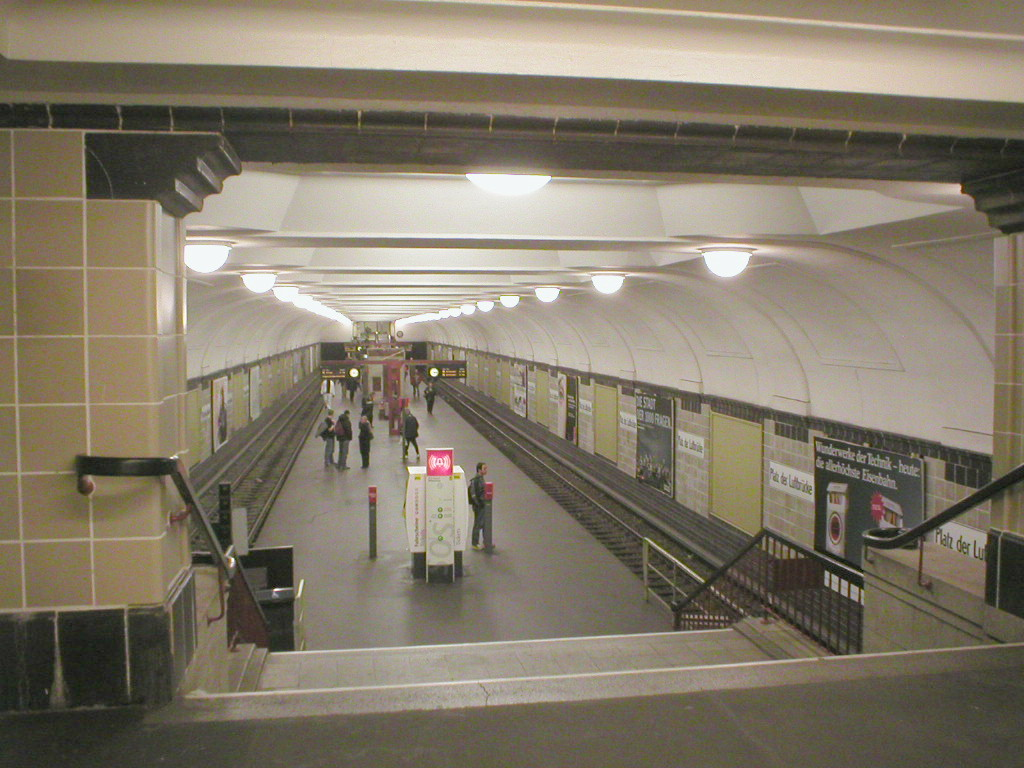 U-Bahn Berlin, Platz der Luftbrücke U6